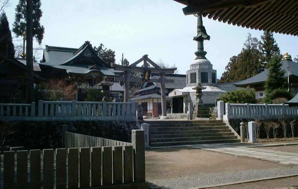 高越寺の境内